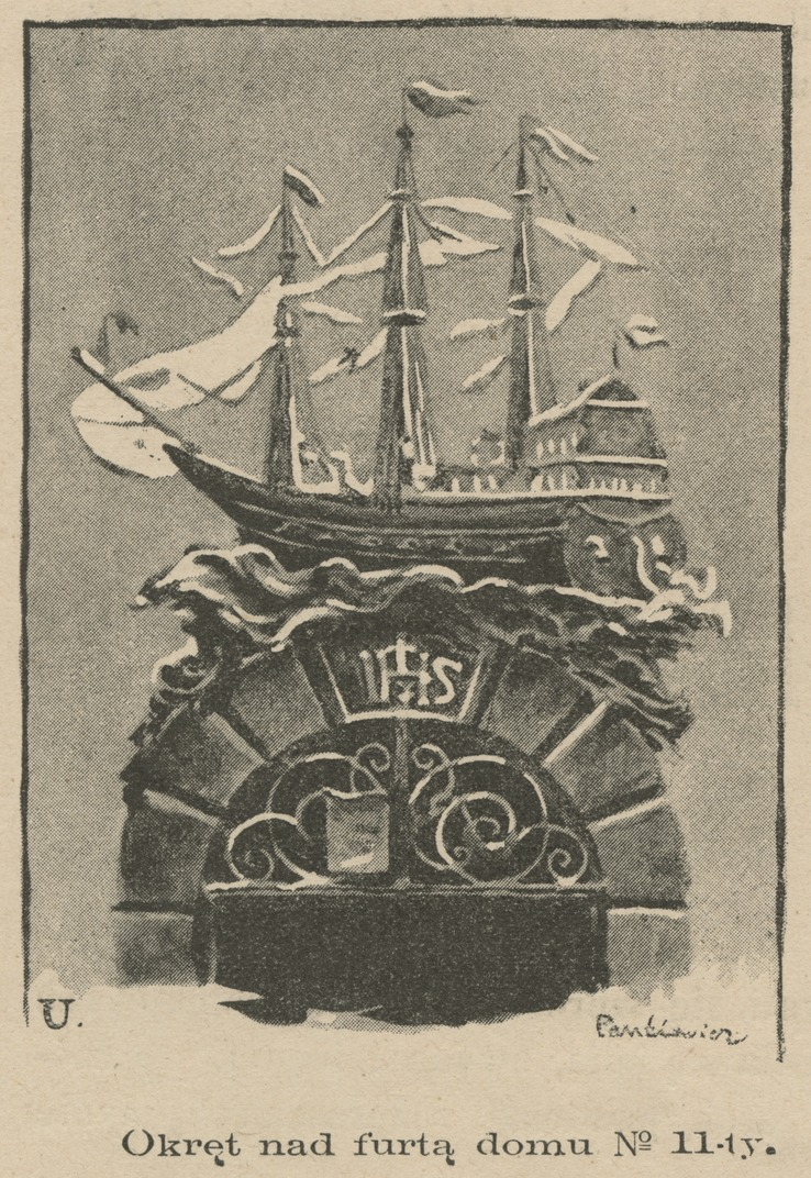 Ulica Świętojańska : Okręt nad furtą domu Nr 11-ty